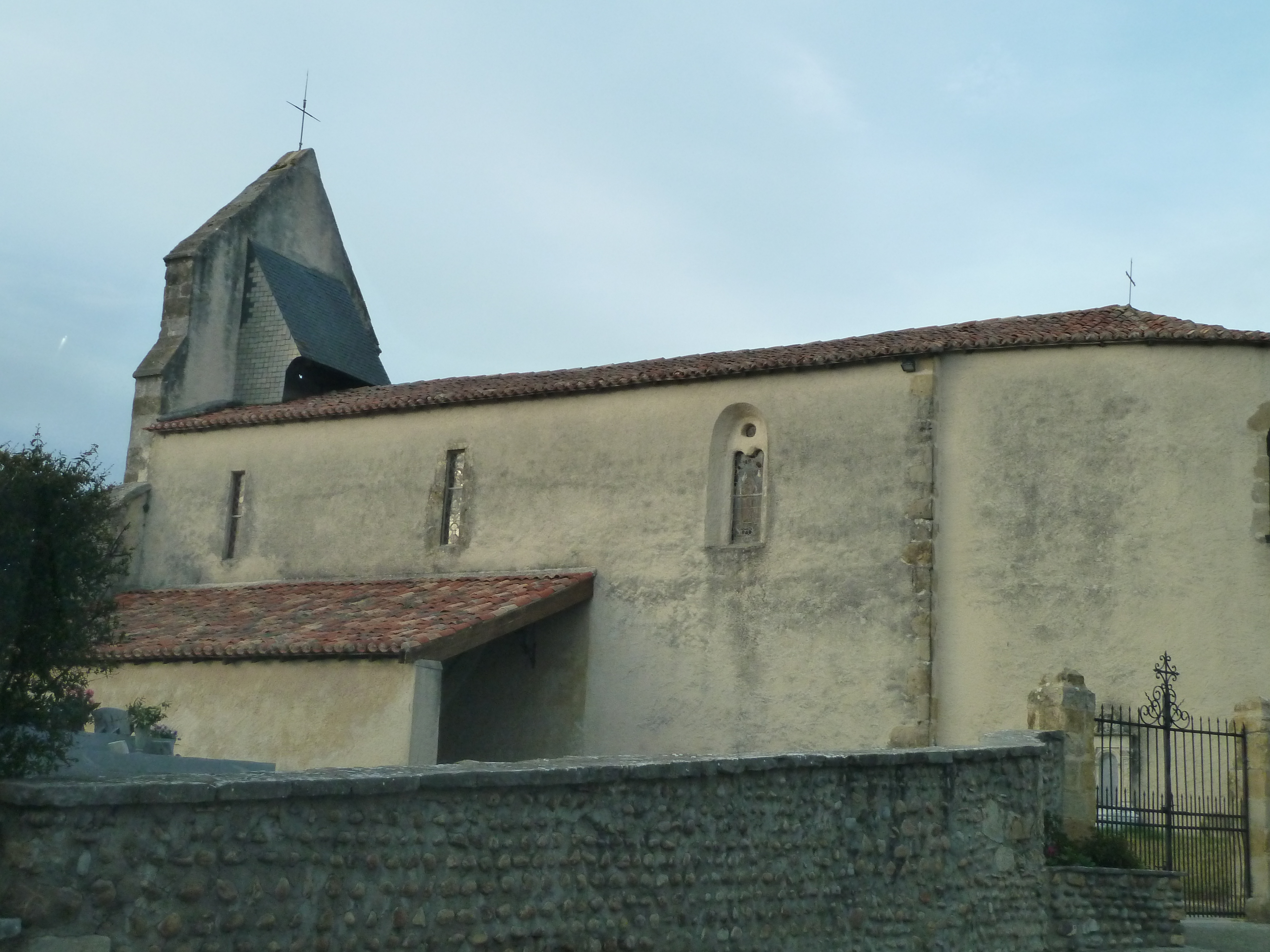 Église de Fichous-Riumayou